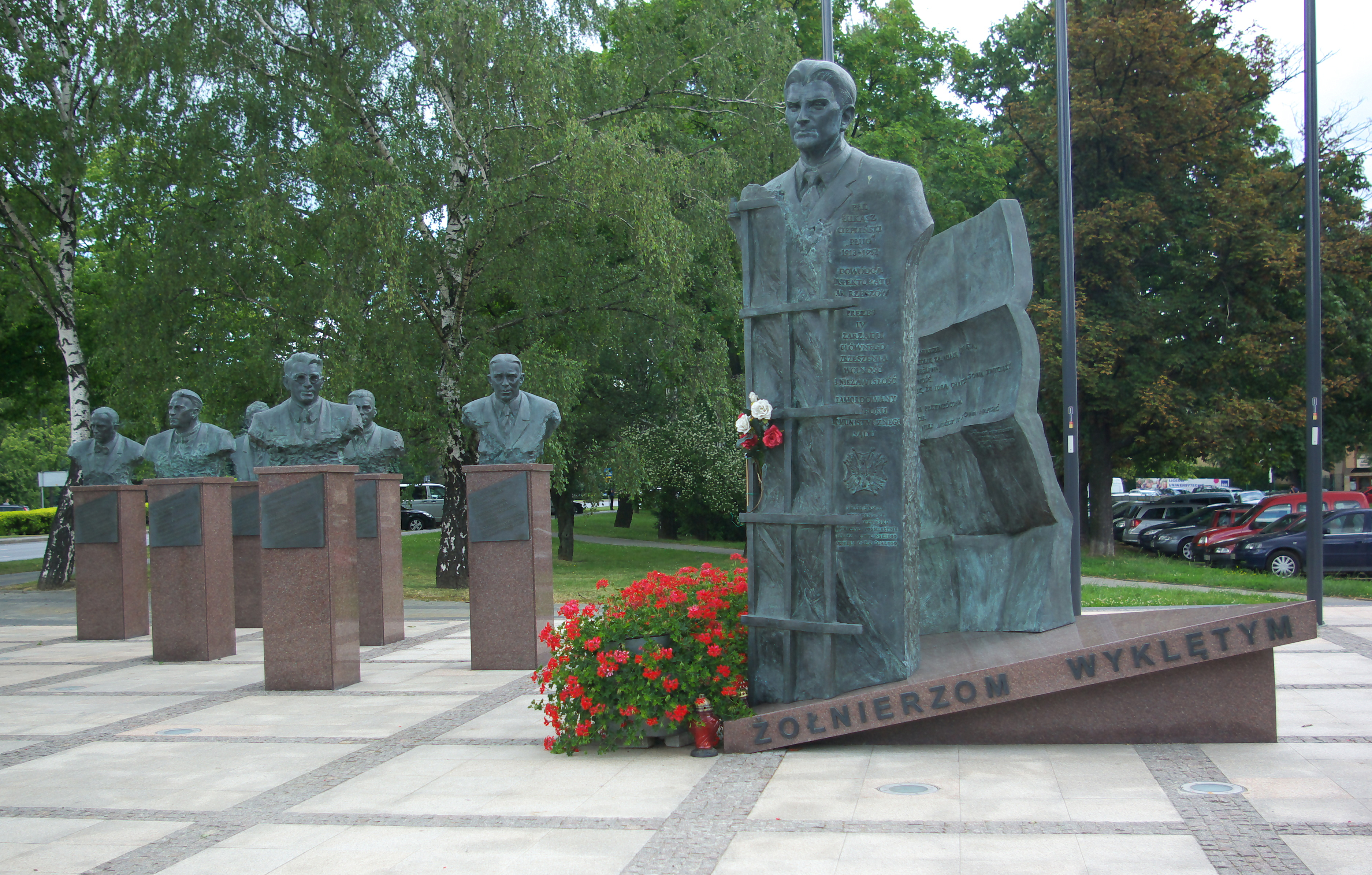 Pomnik Żołnierzy Wyklętych w Rzeszowie przy Alei Łukasza Cieplińskiego. Upamiętnieni członkowie Zrzeszenia Wolność i Niezawisłość: Łukasz Ciepliński, Adam Lazarowicz, Mieczysław Kawalec, Józef Batory, Franciszek Błażej, Józef Rzepka, Karol Chmiel.